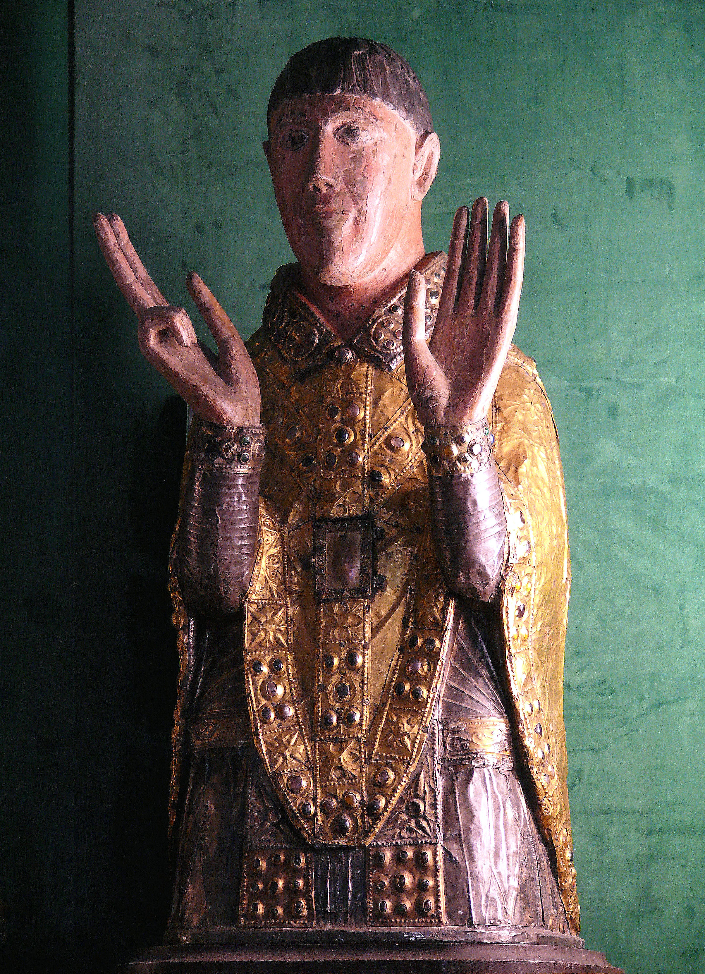 Maurs - Abbatiale - Buste-reliquaire de saint Césaire